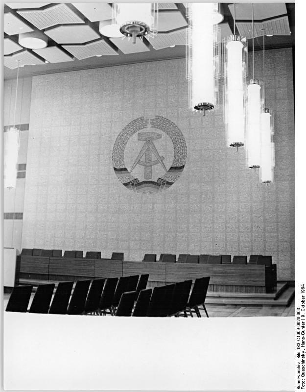 Berlin, Staatsratsgebäude, Festsaal Zentralbild Quaschinskyinsky-Qua-Zi.-9.10.1964 Berlin: Neuer Amtssitz des Staatsrates. Am 3.1.1964 wurde der neue Amtssitz des Staatsrates am Berliner Marx-Engels-Platz feierlich seiner Bestimmung übergeben.UBz: Der Festsaal. Im Hintergrund eine Mosaikarbeit, welche mit ca.1Mio Glas-und Natursteinen ausgeführt ist.